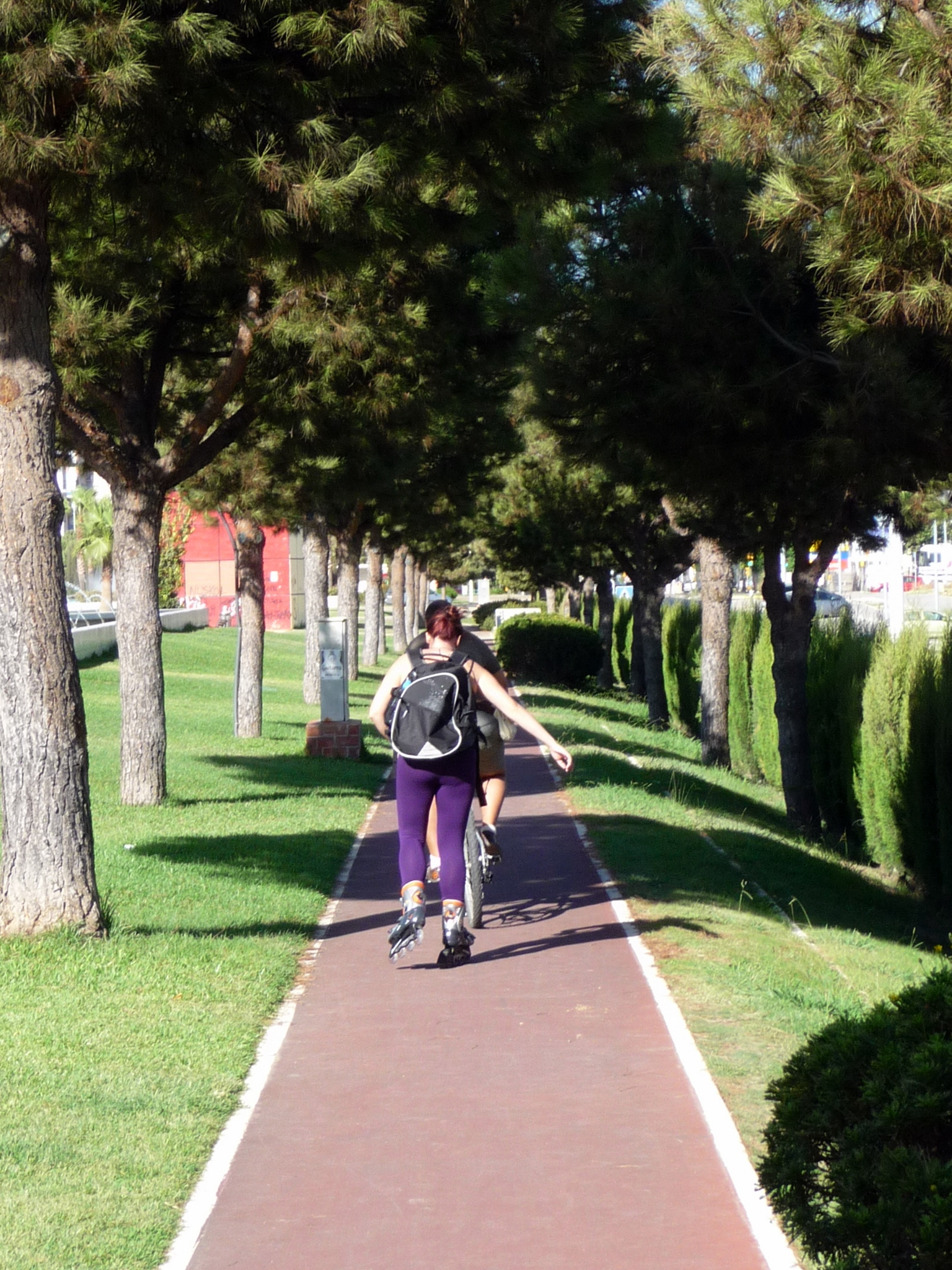 Tramo de Carril-bici en Huelva.